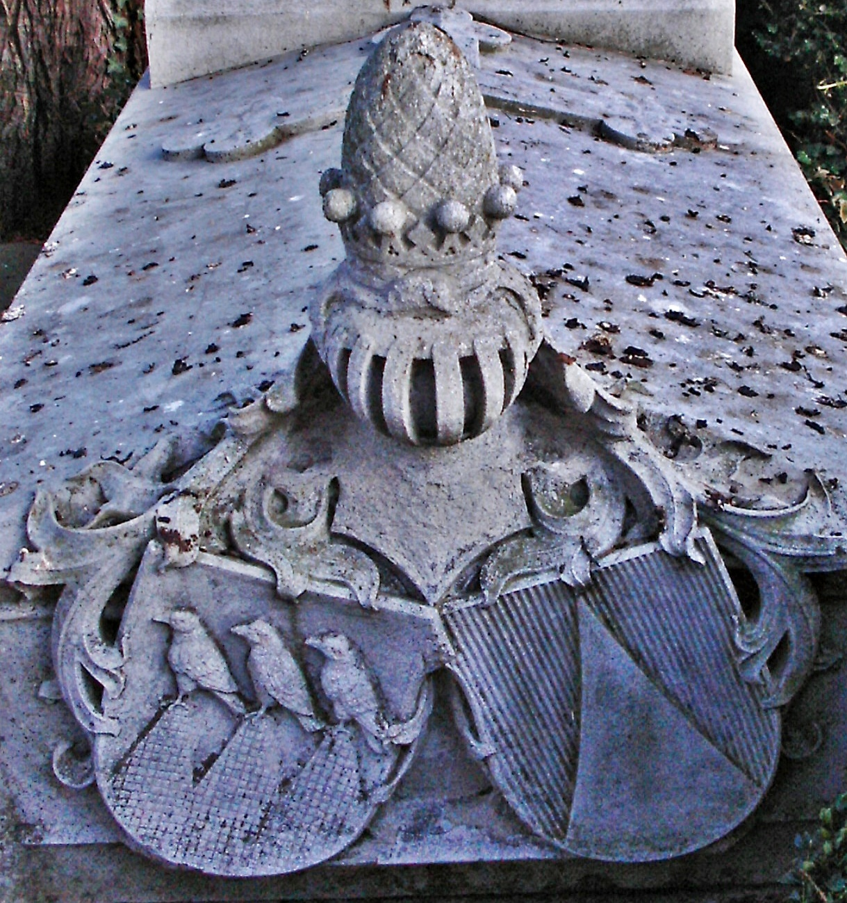 Allianzwappen Grafen Waldner von Freundstein (links) und von Stumm (rechts), Hauptfriedhof Mannheim